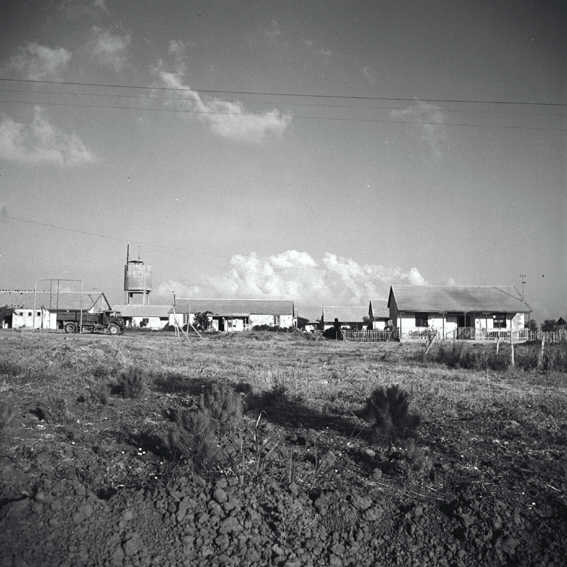 יבנה - מראה